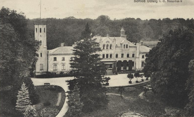 Pałac w Dolsku - pocztówka z 1933 r.